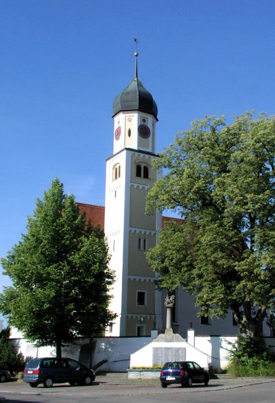 Church St. Remigius in Augsburg-Bergheim